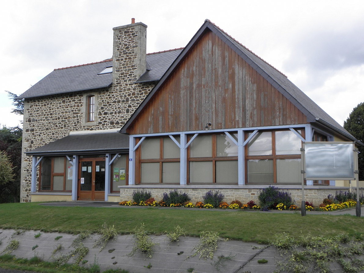 Mairie de Longaulnay (35).